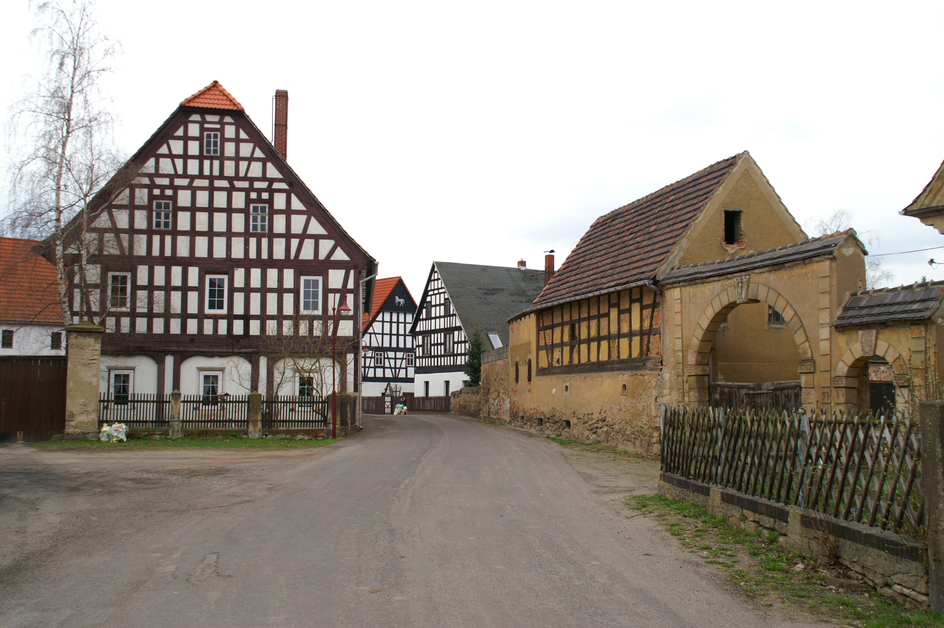 Straße in (Thüringen)